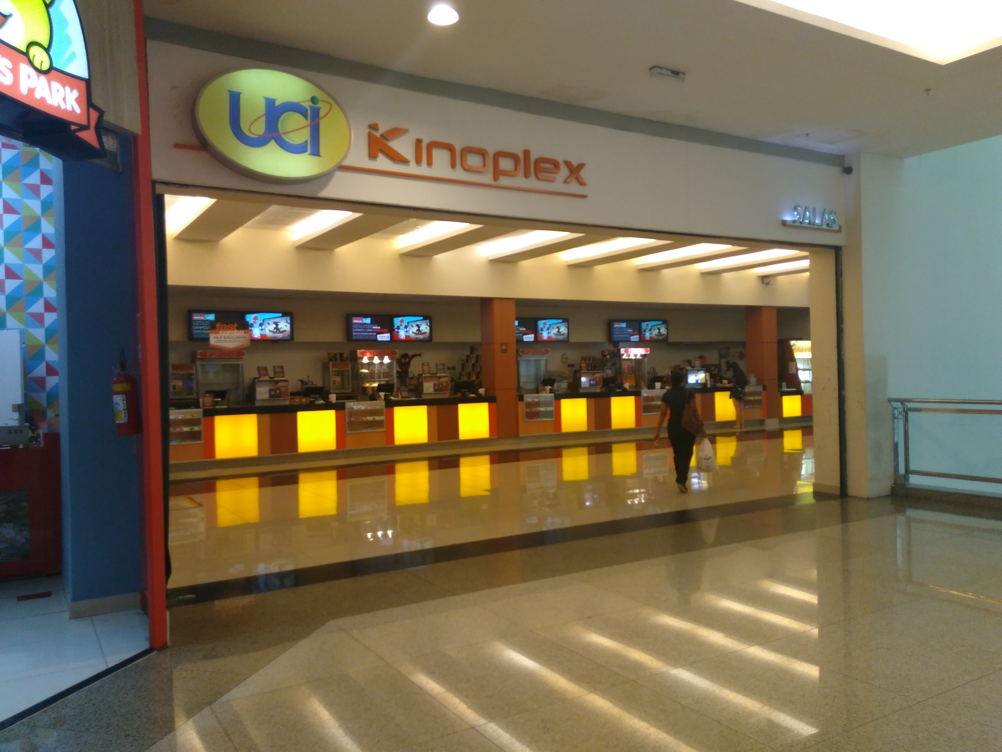 Área exterior do UCI Kinoplex Shopping da Ilha